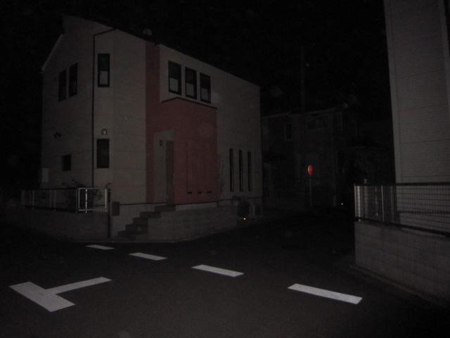 計画停電が実施された習志野市の住宅の様子です。周りに明かりがありません。